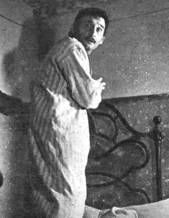 Renato Rascel ne "Il cappotto" (Lattuada, 1952)